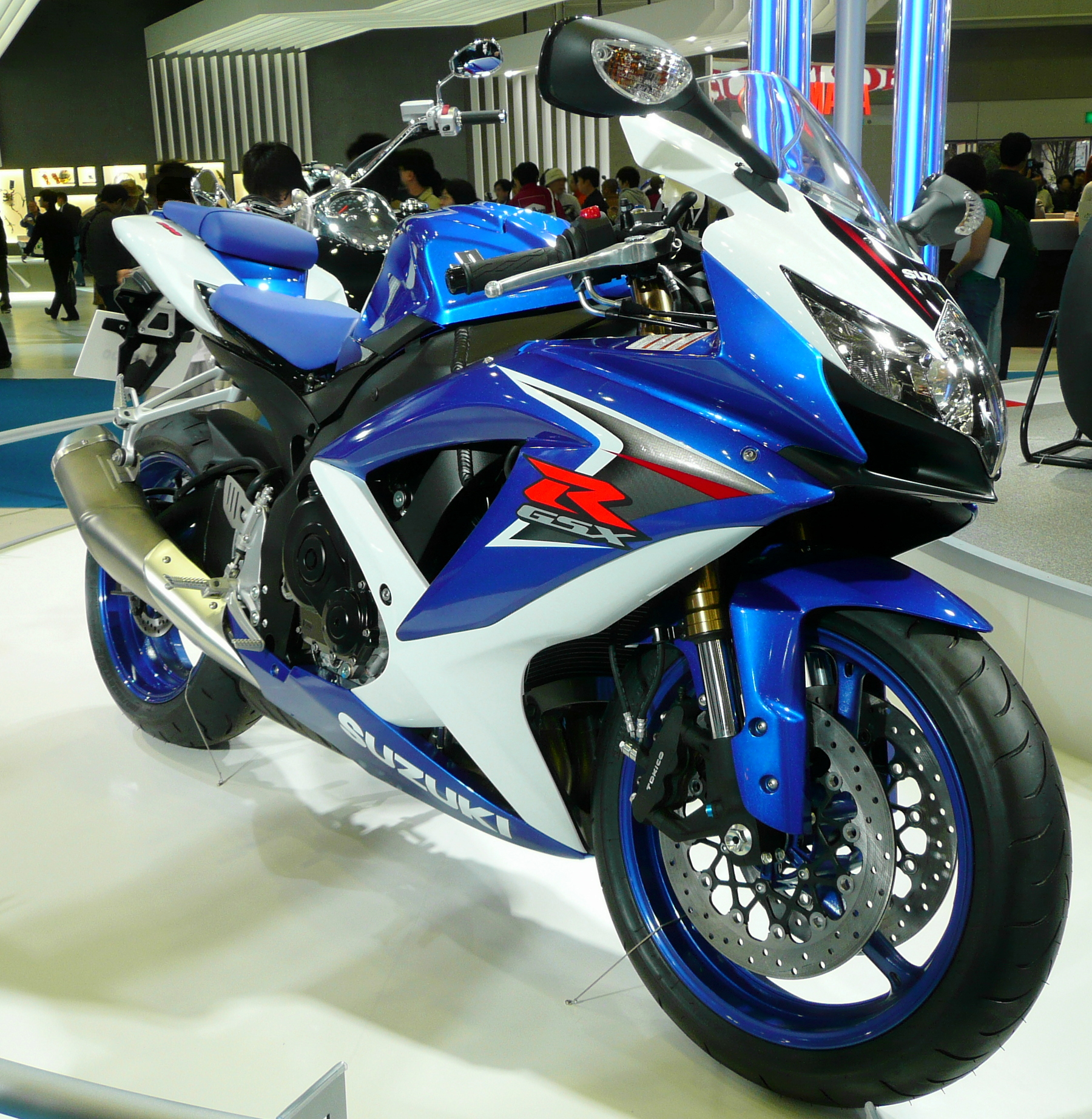 Suzuki GSX-R600 (2007 Tokyo Motor Show)